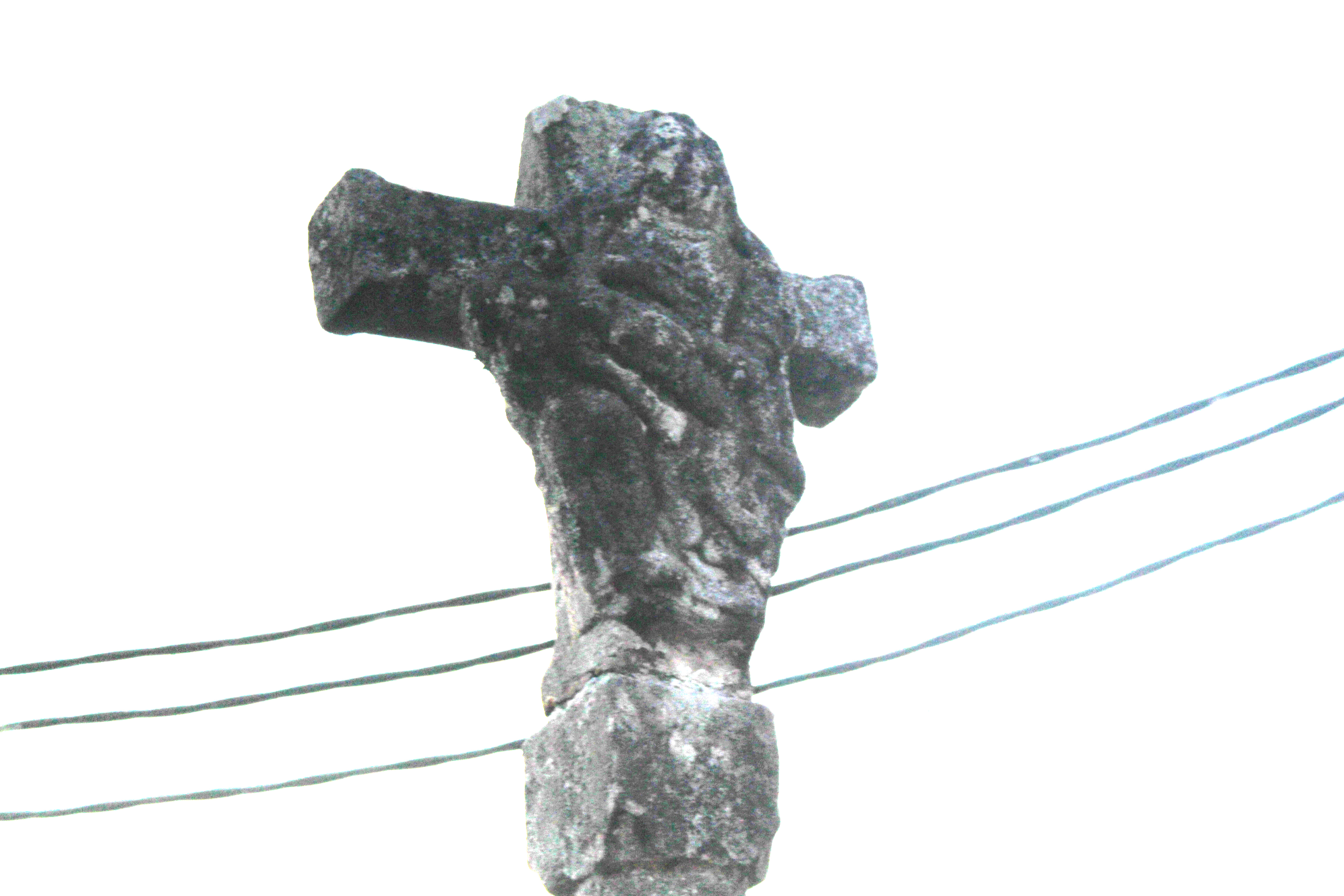 Detalle do relevo da virxe das Angustias no cruceiro de Piquetes, Mañufe, Gondomar